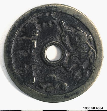 1935.50.4634 Amulett i form av ett mynt. Amuletten är av brons, och har ett cirkulärt hål i mitten. Amuletten är försedd med kinesisk skrift och är dekorerad med figurer. (AA) "Amulettmynt av brons." (MLK) China Föremål 4634-4679 är en gåva av Hedinexpeditionen 1945. (MLK) Föremål 4634-4679 är förvärvat av Folke Bergman. (MLK) Hedinexpeditionen, fjärde centralasiatiska expeditionen (1927-1935).